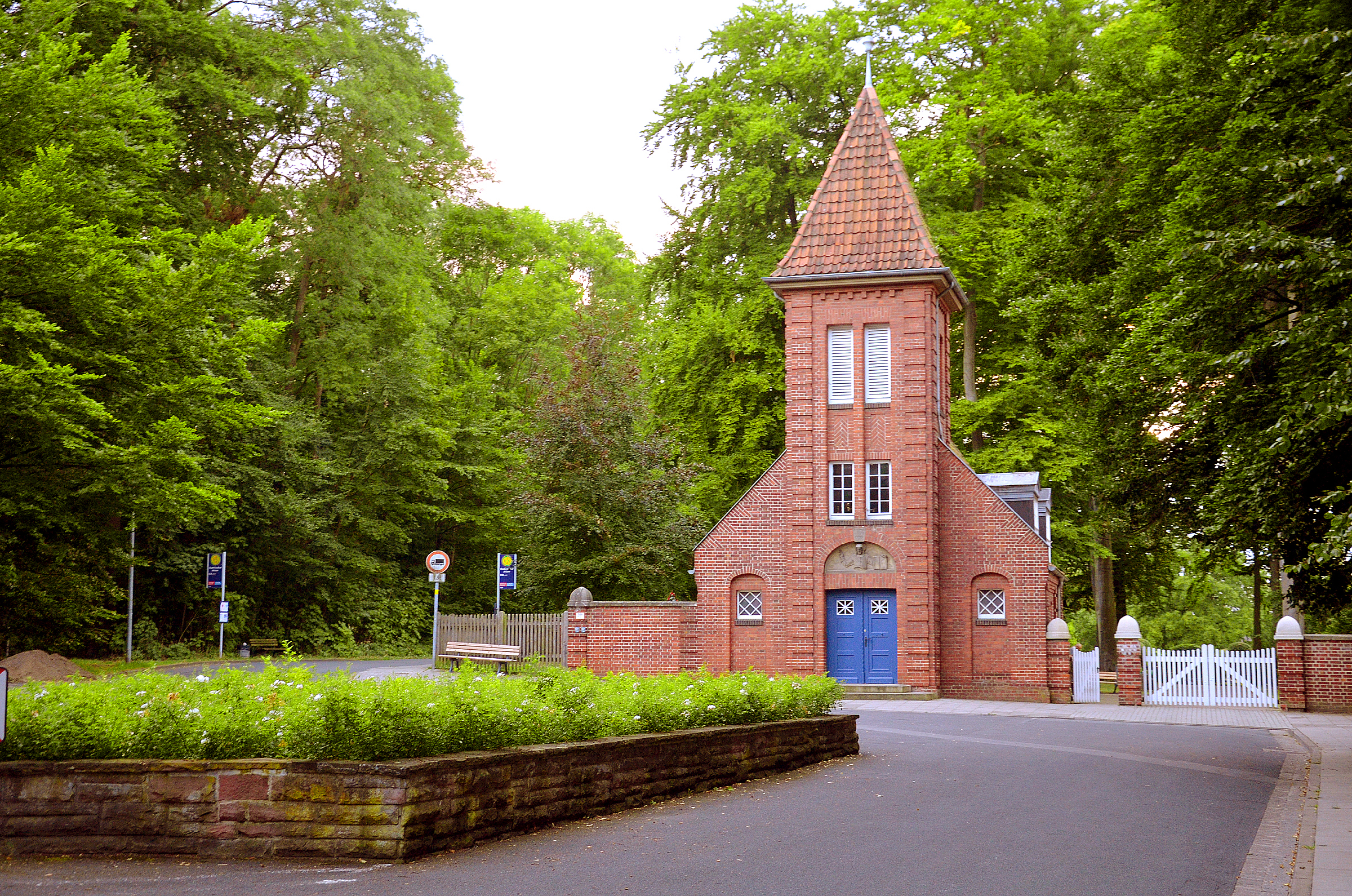 Blick auf die denkmalgeschützte Ensemble der Kapelle und des Eingangs zum Stadtteilfriedhof Ahlem in Hannover auf dem höchsten Punkt der Mönckebergallee am Ahlemer Holz. Für Fahrradfahrer direkt am Grünen Ring der Region Hannover gelegen, ist der Ort auch etwa auch mit dem Bus zu erreichen ...